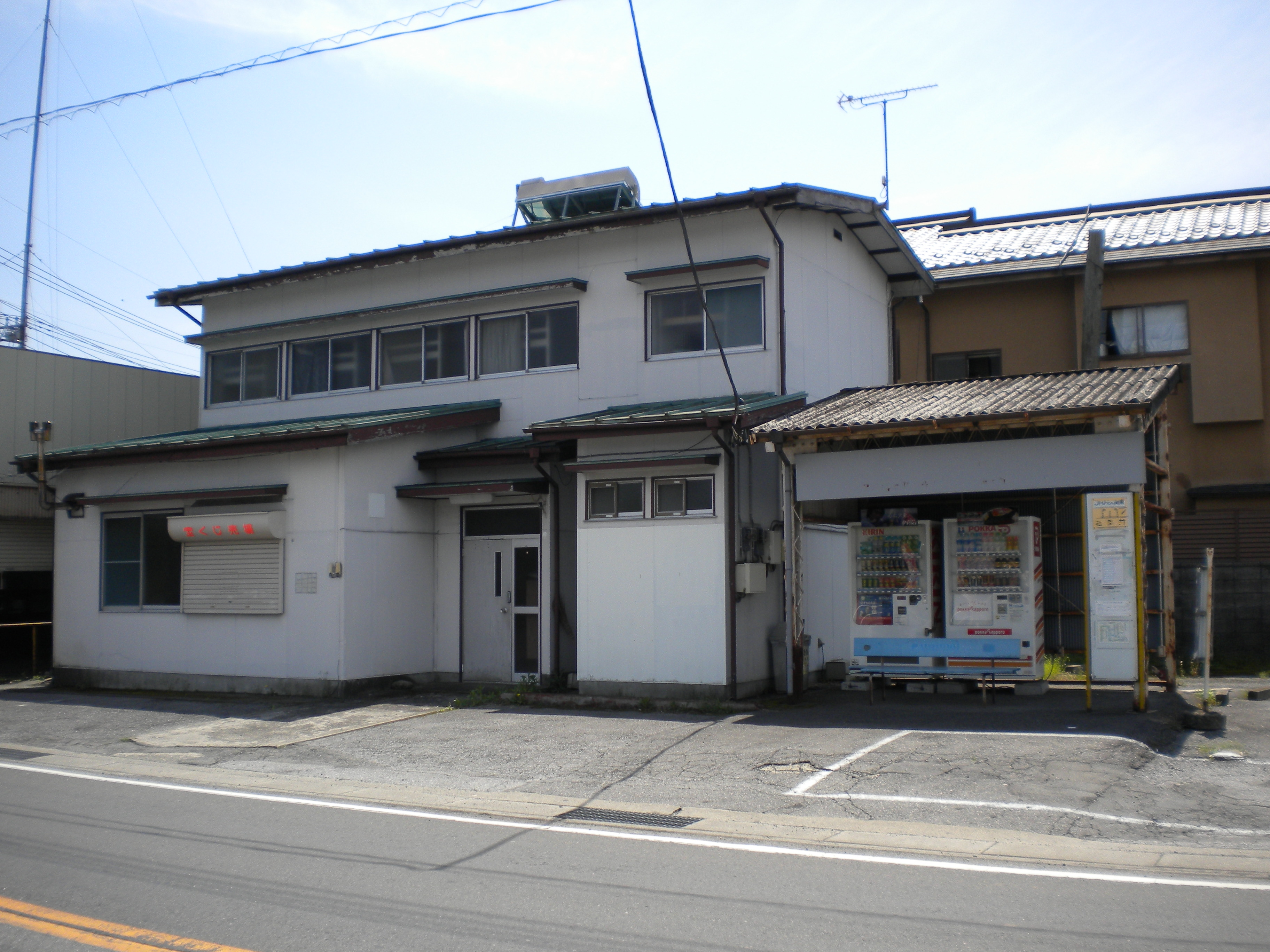 祖母井停留所（祖母井駅） 栃木県芳賀郡芳賀町大字祖母井 投稿者撮影